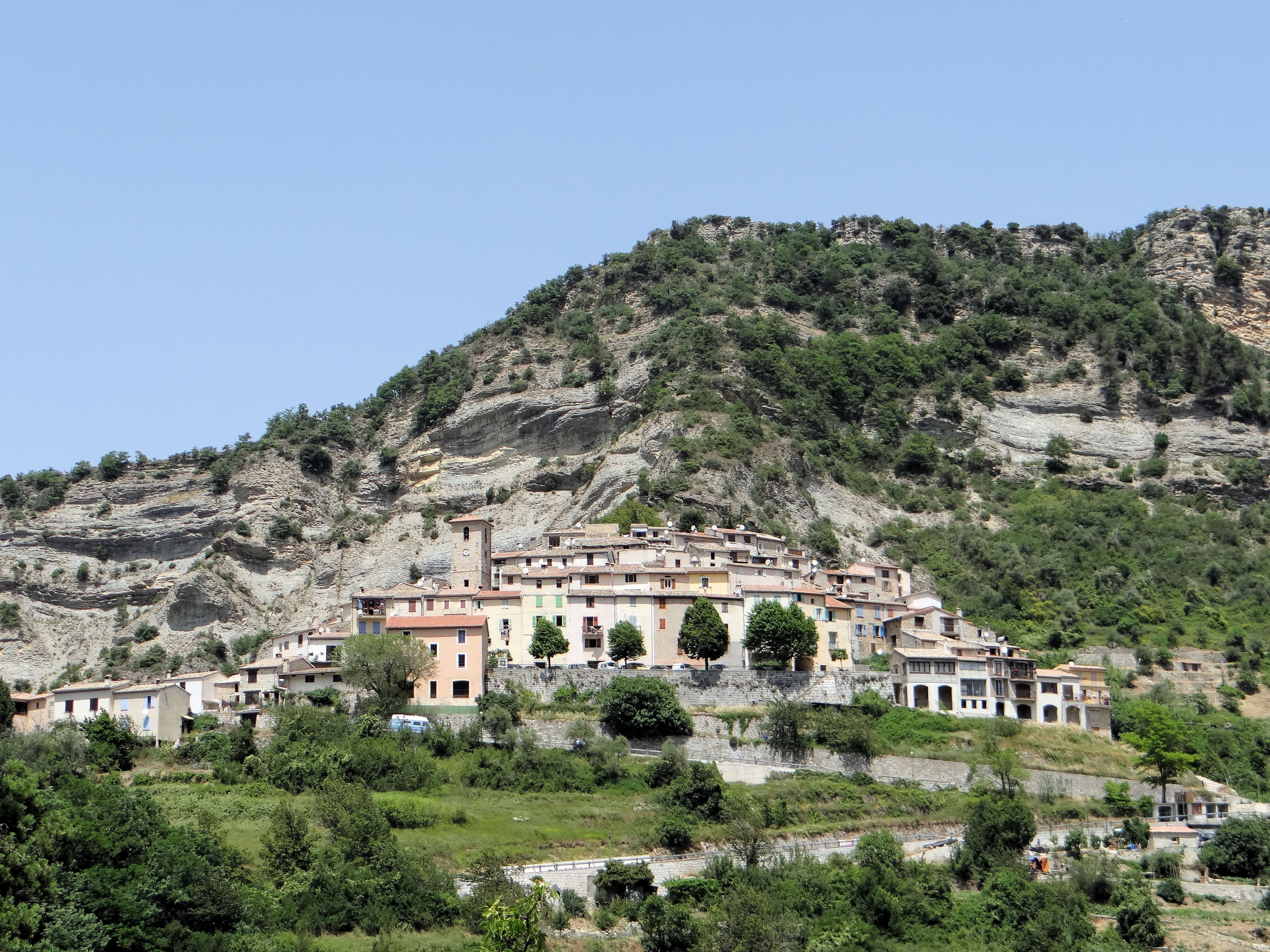 Les Ferres - Vue d'ensemble